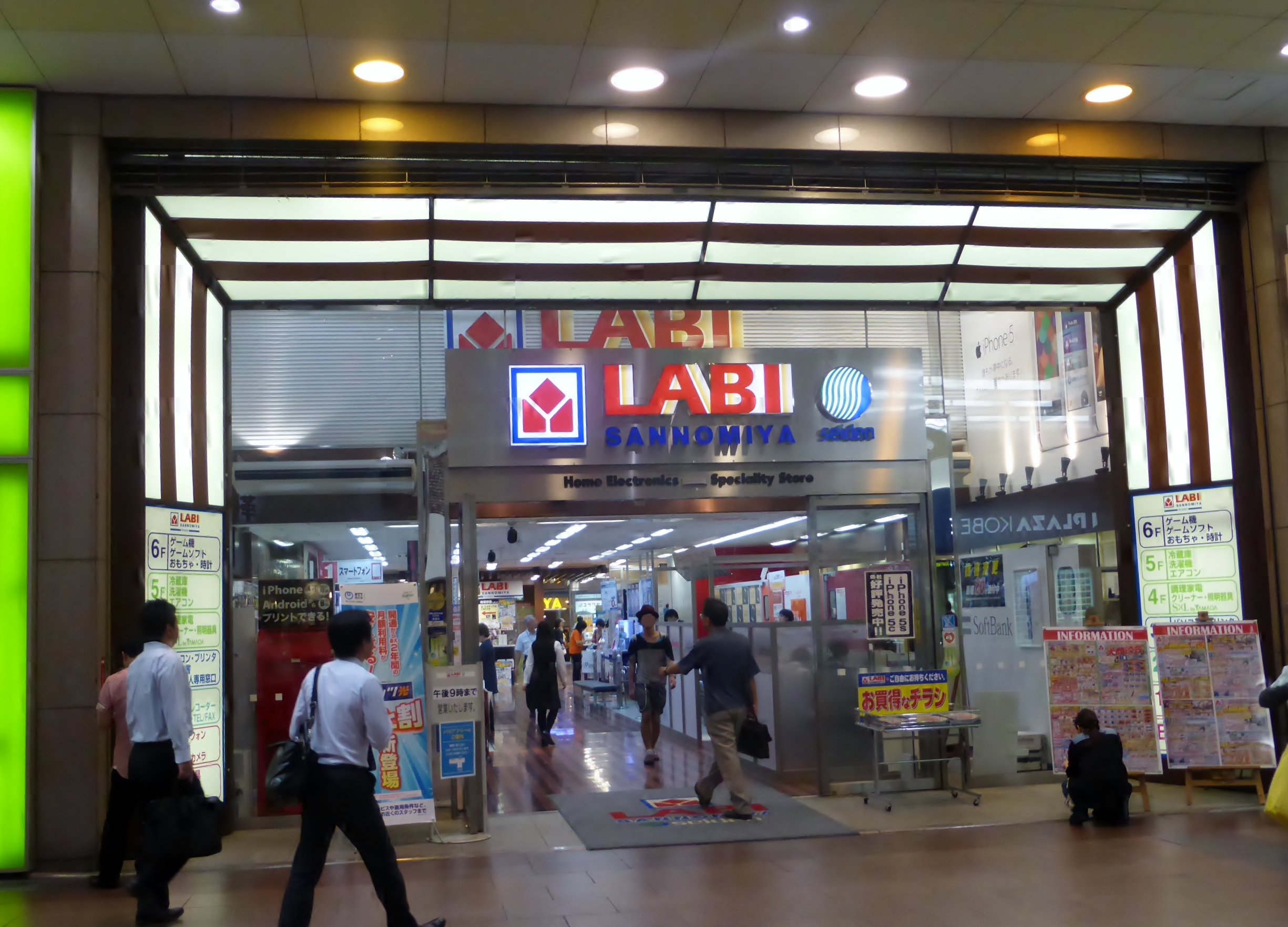 株式会社星電社がフランチャイジーとなっているLABI三宮のさんプラザ側入口を撮影。尚、株式会社星電社の登記上本社も入居している。